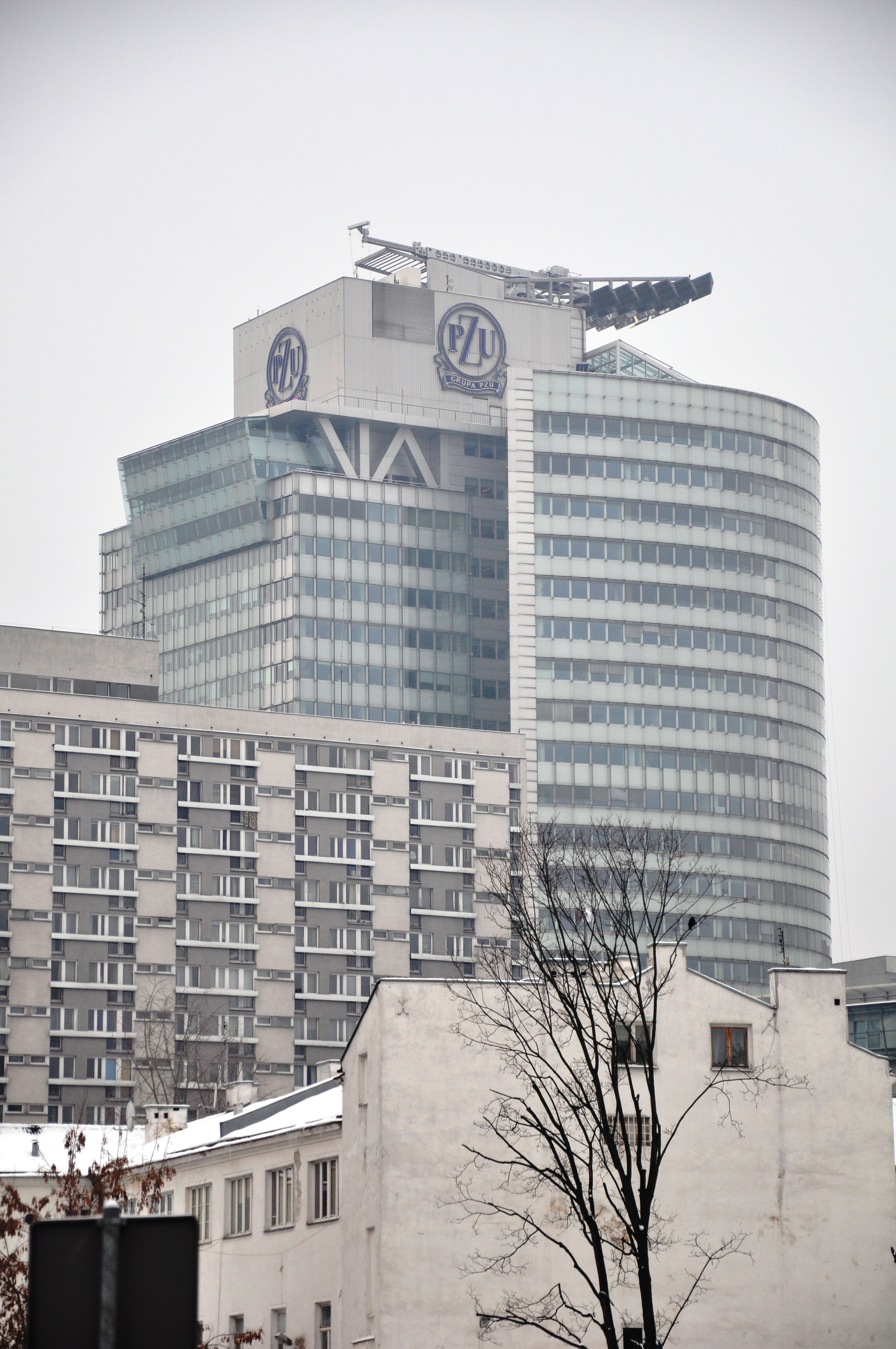 PZU-Versicherung, Zentralgebäude in Warschau (Blick vom Osten)